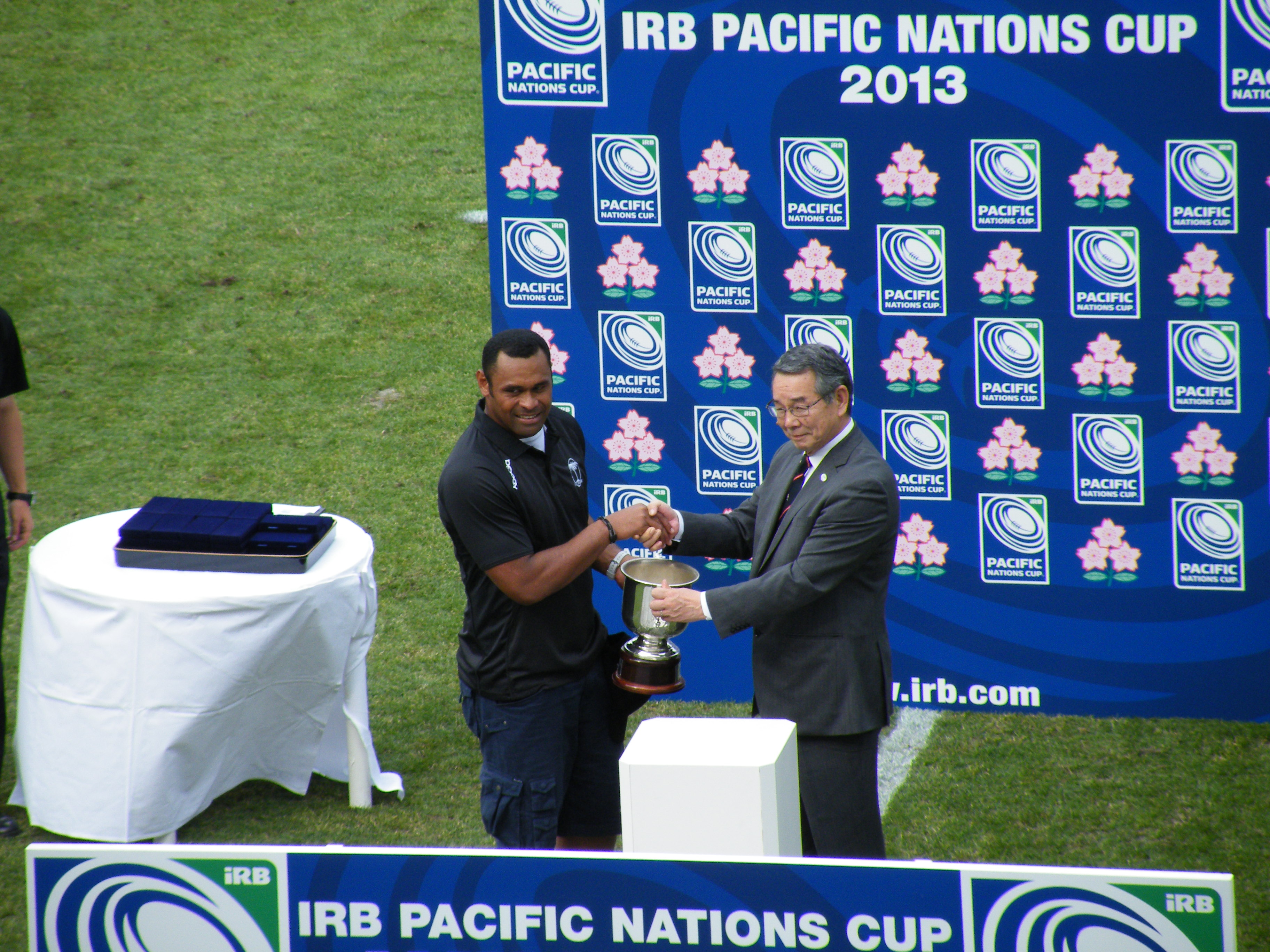 IRBパシフィック・ネイションズ・カップ フィジーの表彰式